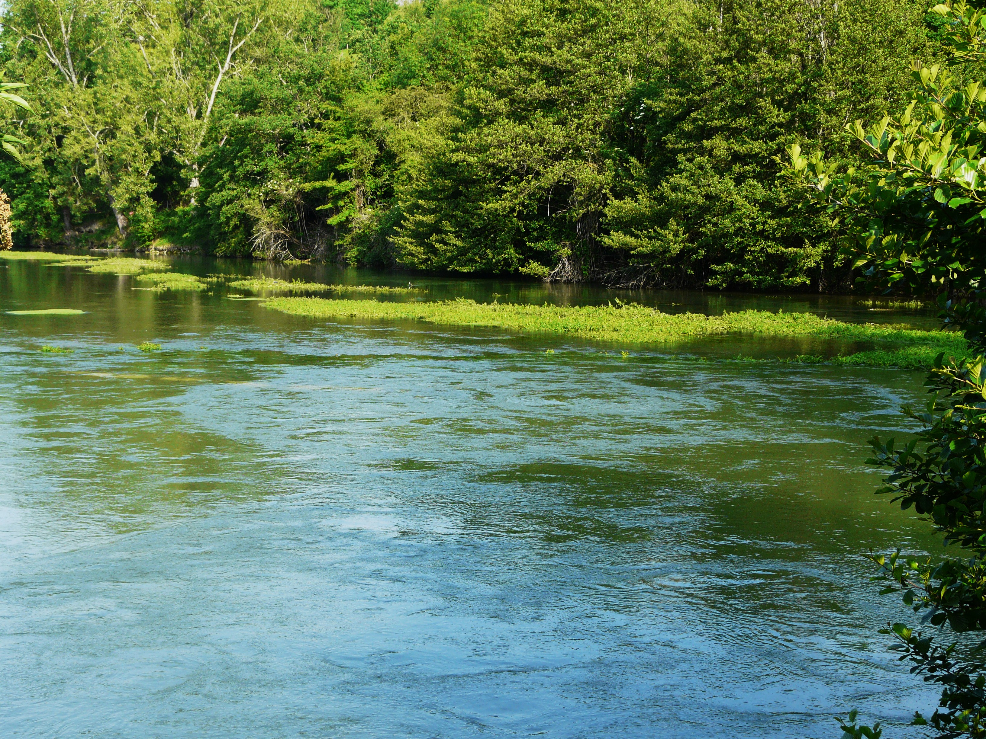 L'une des sources de la Touvre: le Bouillant. Cette exsurgence est alimentée par des rivières souterraines venant du karst de La Rochefoucauld.